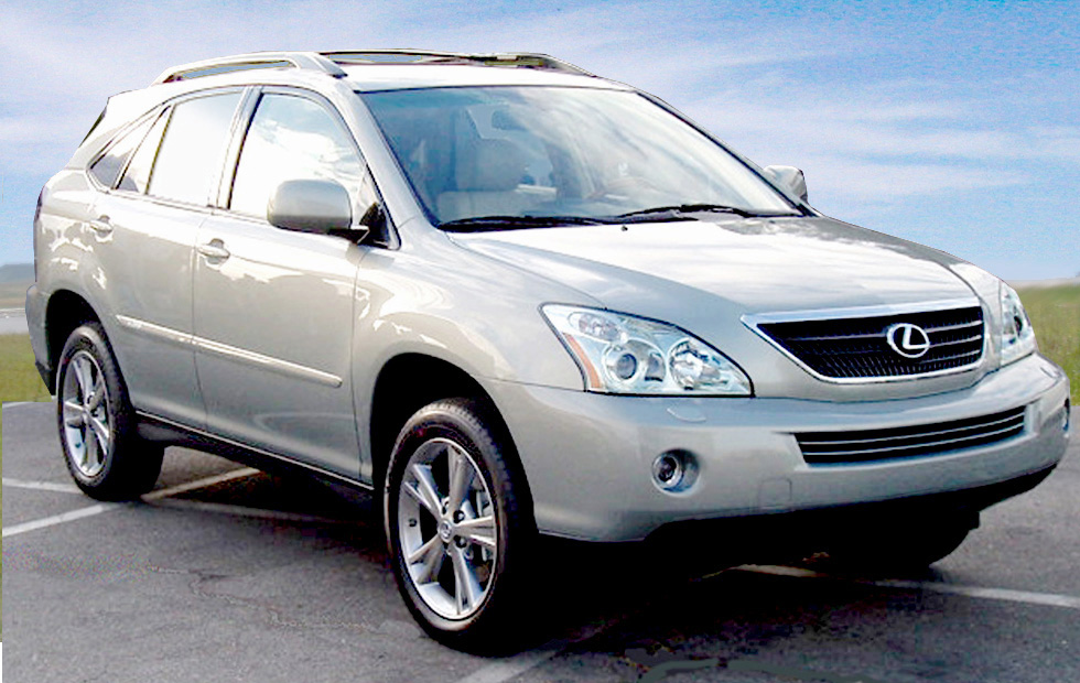 Lexus RXh